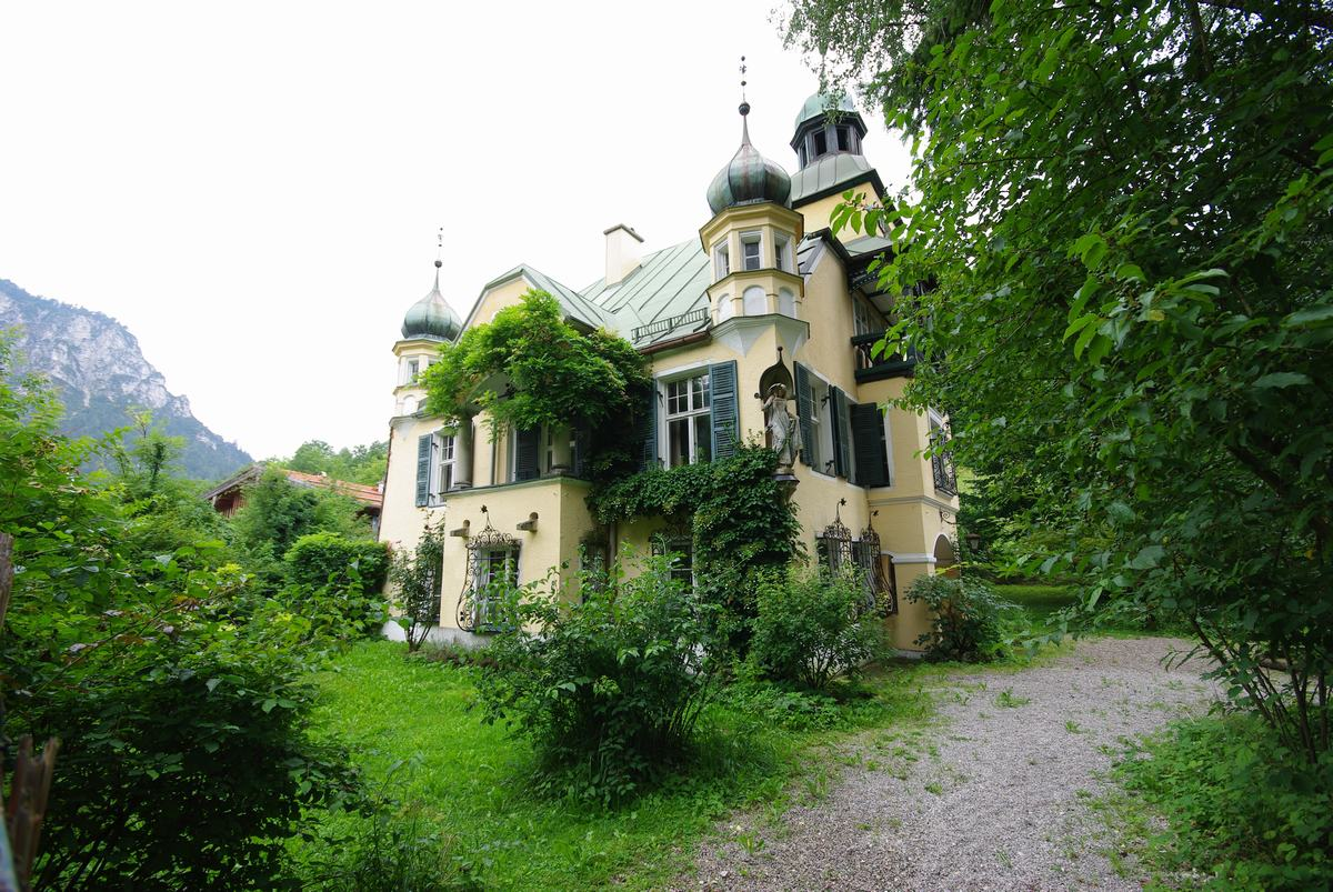 Schmalschlägerstr. 17, Bad Reichenhall. ehem. Forsthaus, sog. "Schlössl". Zugehörige Gebäude: Rauchhaus mit Laubsägearbeiten Scheune mit Hühnerstall